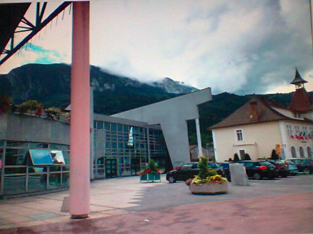 view of the town